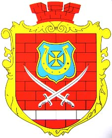 Герб села Кальник